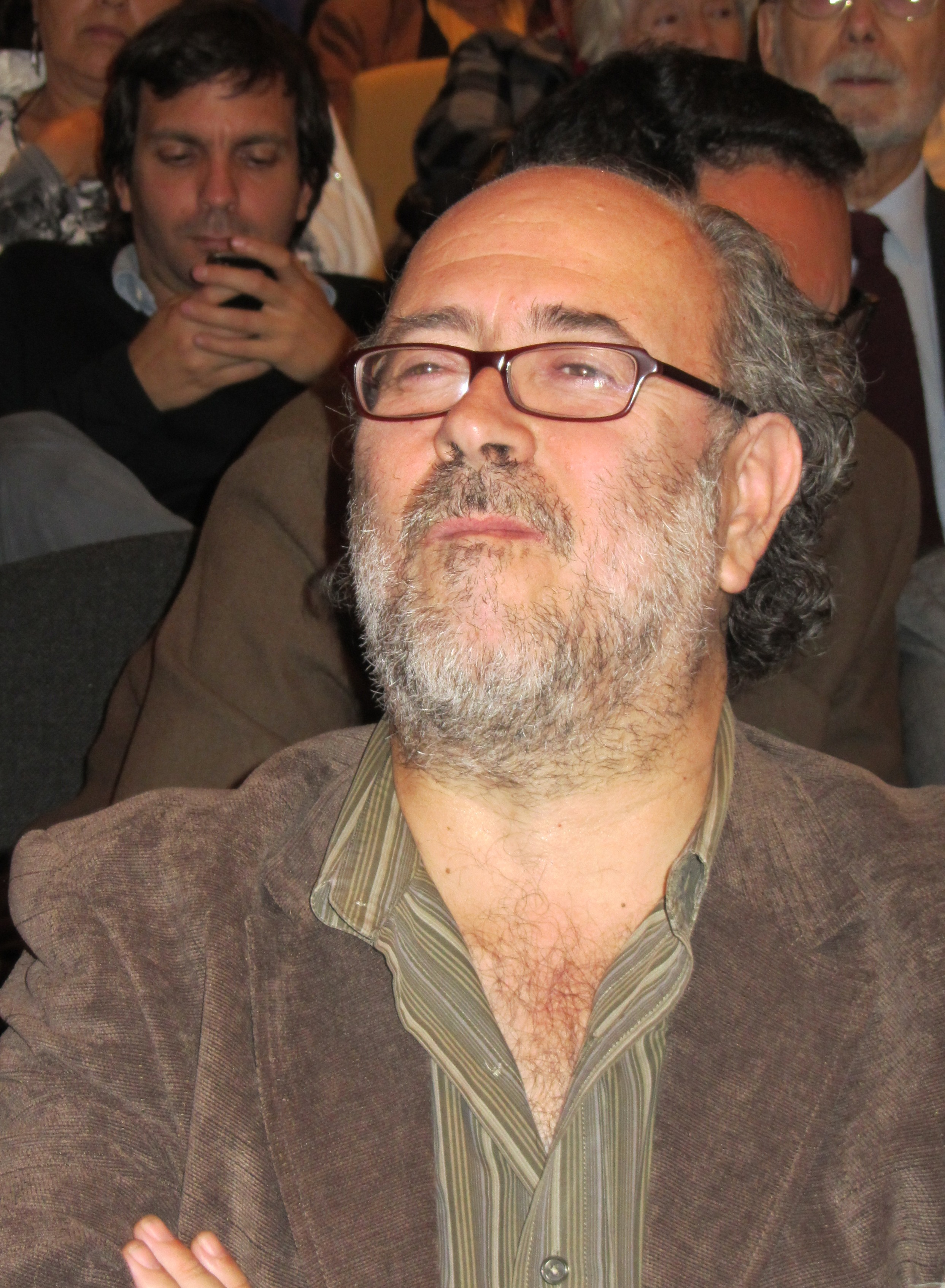 El cantautor chileno Eduardo Peralta; presentación del libro Íntegra de Gonzalo Rojas en la Biblioteca Nacional de Santiago, 25 de abril de 2013